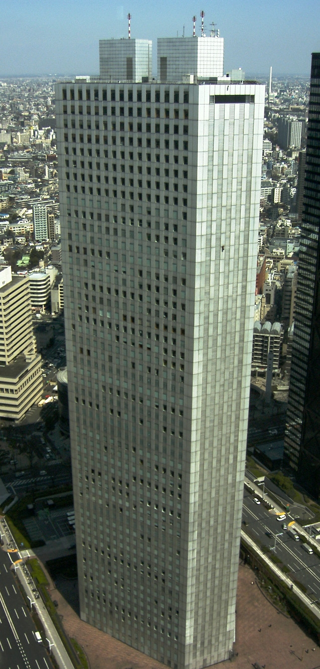 Shinjuku SumitomoBuilding Tokyo Japan